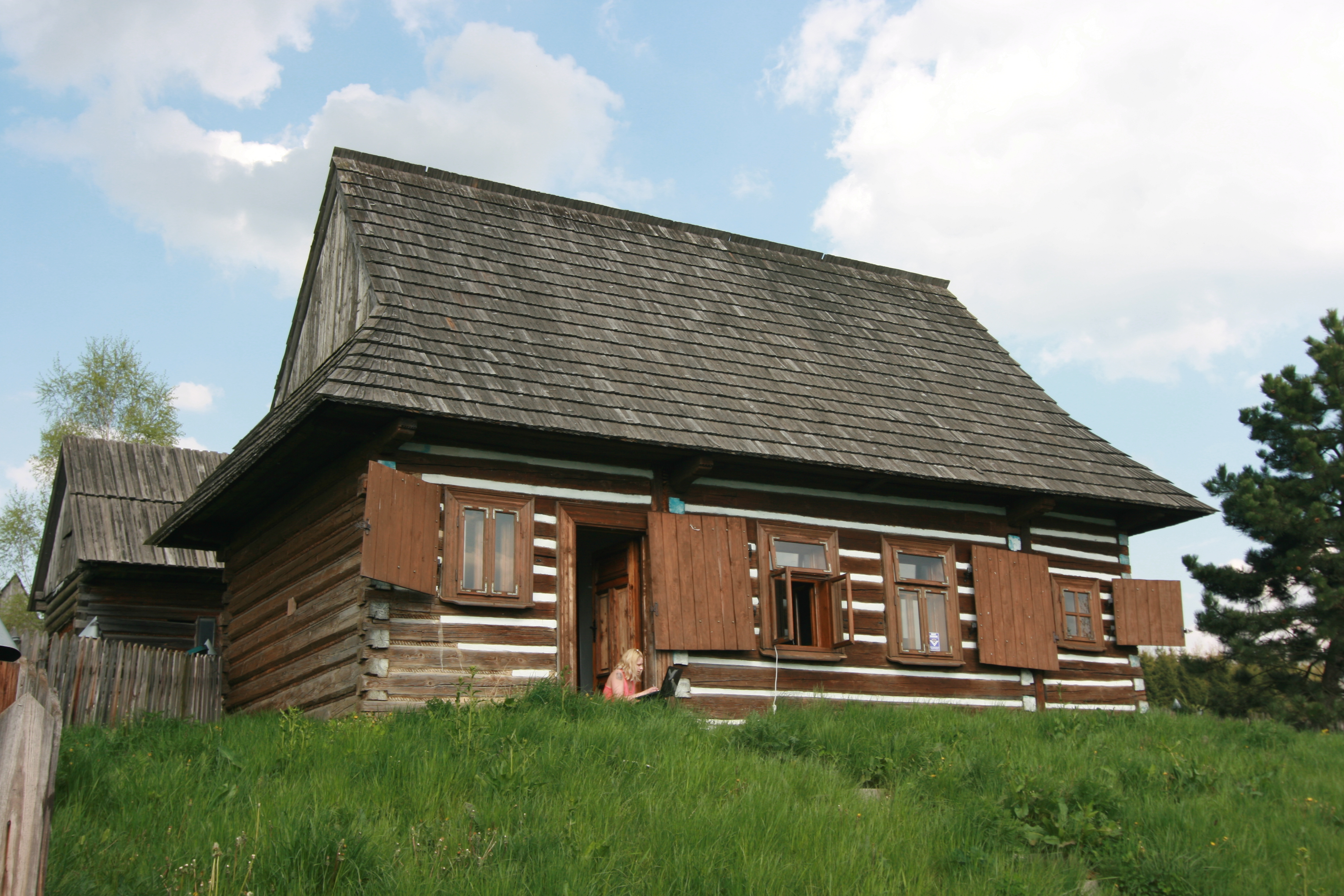 Jedna z zagród w Osadzie Czorsztyn , widok od południowego zachodu